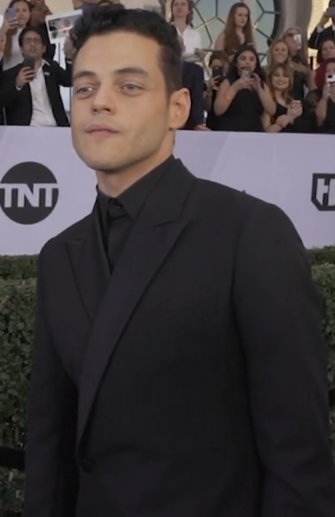 Rami Malek at 2019 Screen Actors Guild Awards Red Carpet